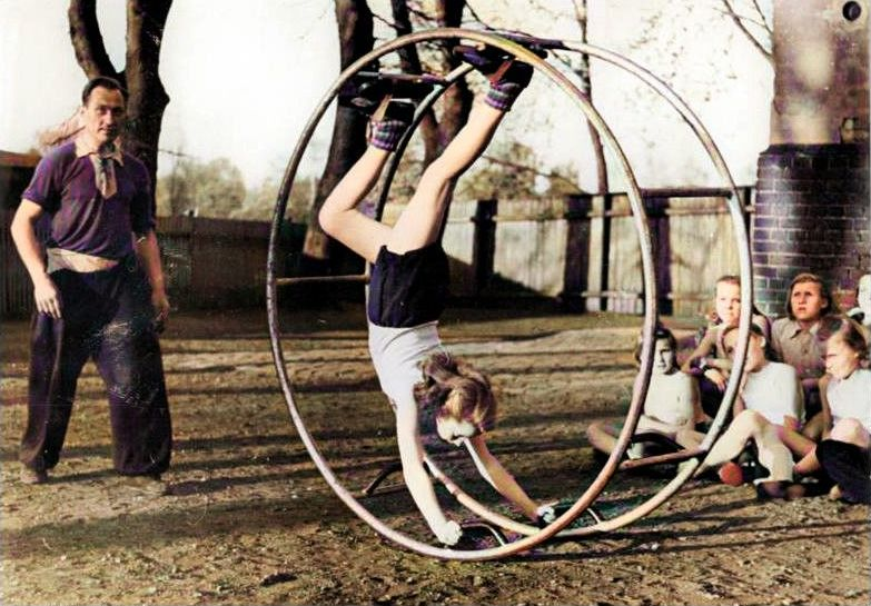 Berlin, Sportunterricht mit Rhönrad Illus Richter 26.4.1951 Sie üben für das Volksfest. Die Schüler der 1. und 2. Volksschule in Berlin-Köpenick üben mit ihrem Sportlehrer Herrn Lautwein Rhönradvorführungen, denn sie werden am 1. Mai bei dem Volksfest in Köpenick mitwirken.